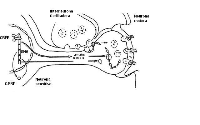 mecanismo de la sensibiliazación conductual